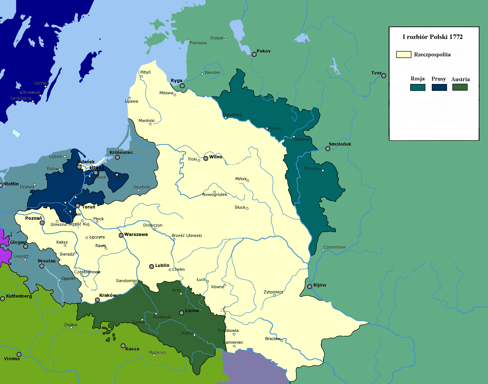 Pierwszy rozbiór Rzeczypospolitej Obojga Narodów, 1772